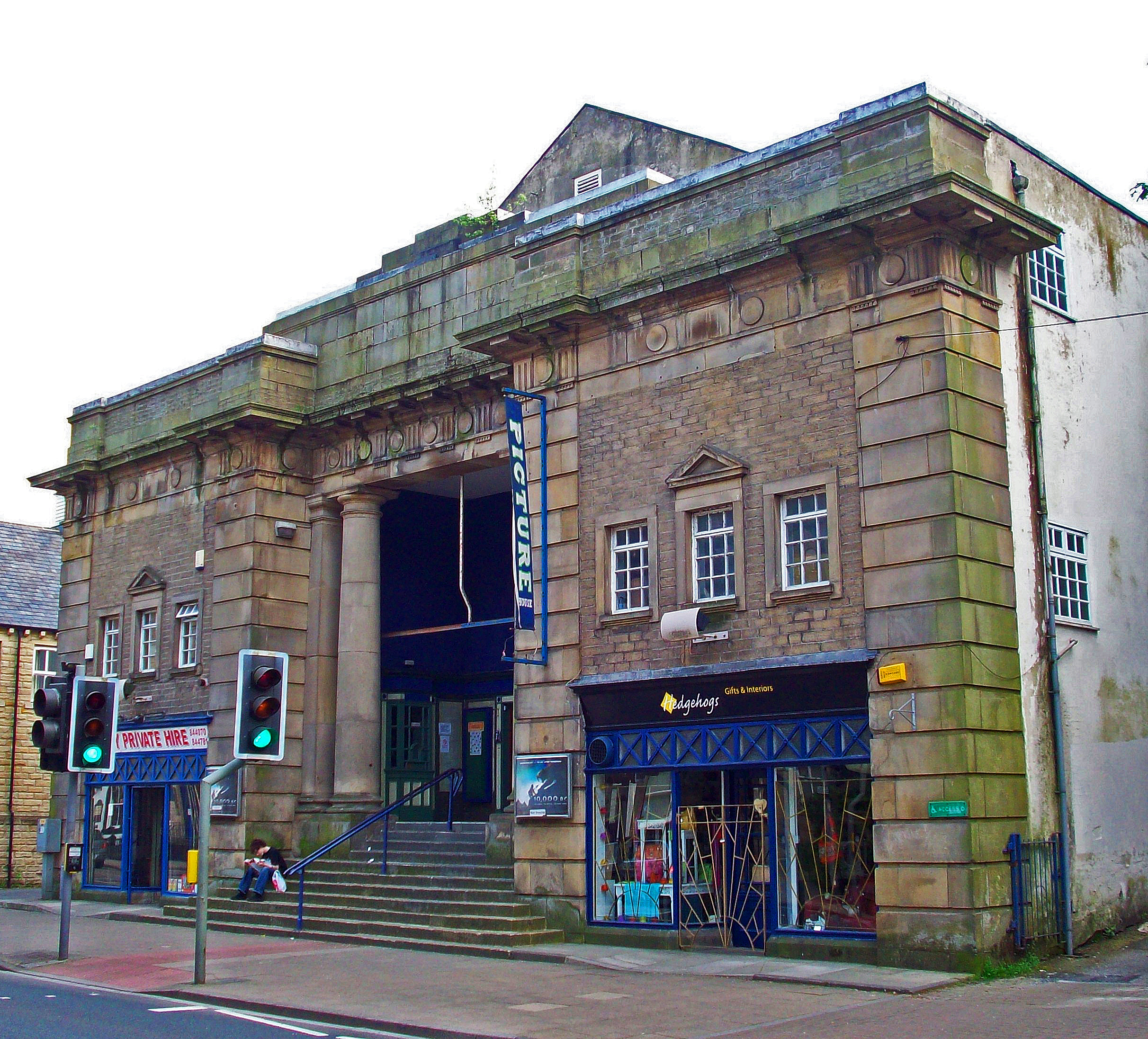 Hebden Bridge